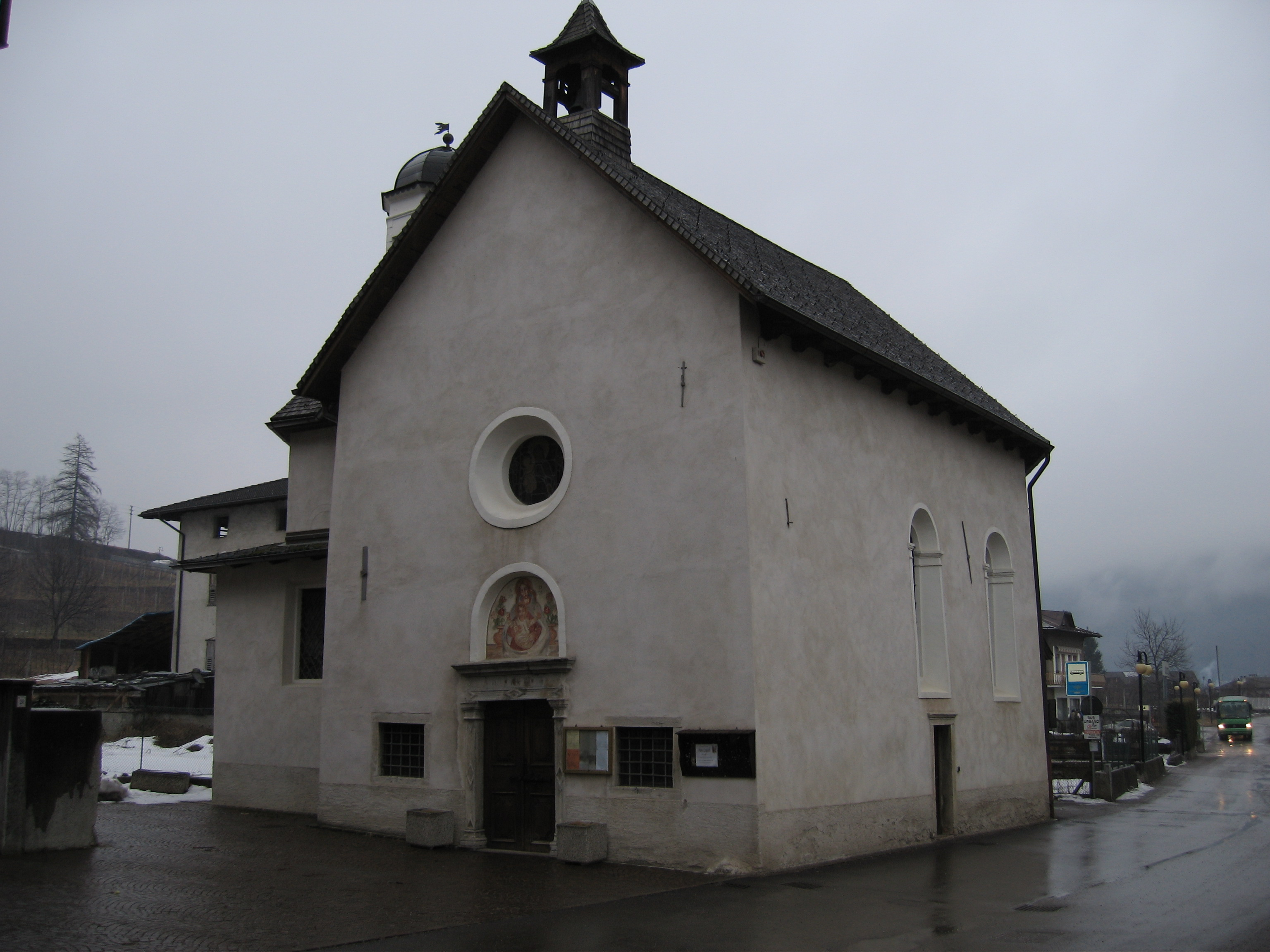 Chiesa dedicata alla Beata Vergine Maria del Monte Carmelo in Presson